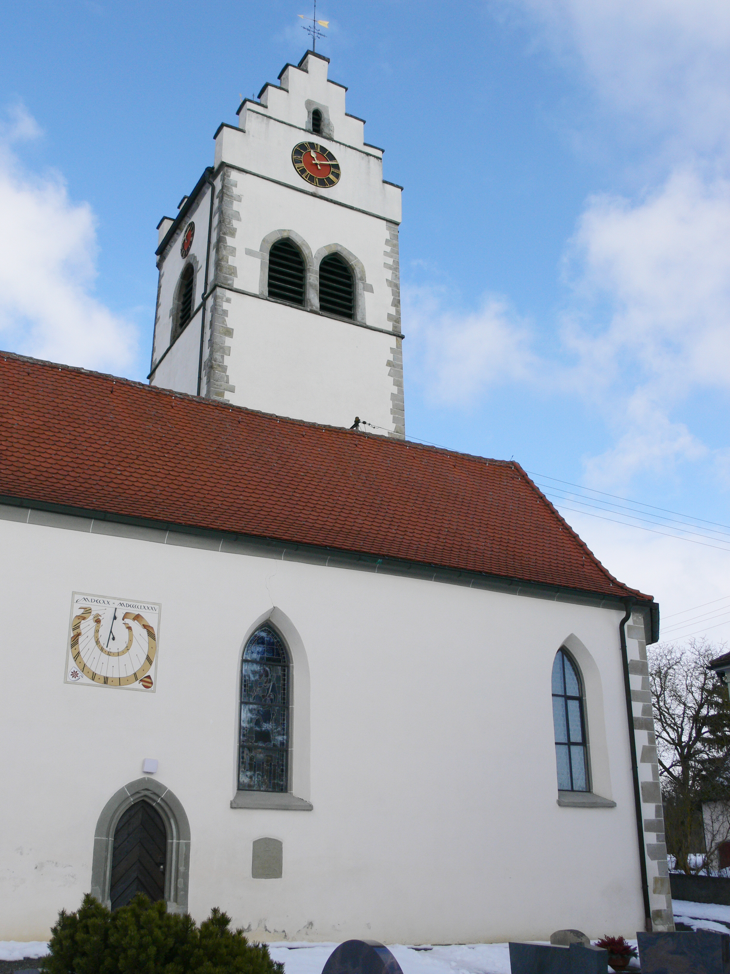 Limpach, Gemeinde Deggenhausertal: Pfarrkirche St. Georg